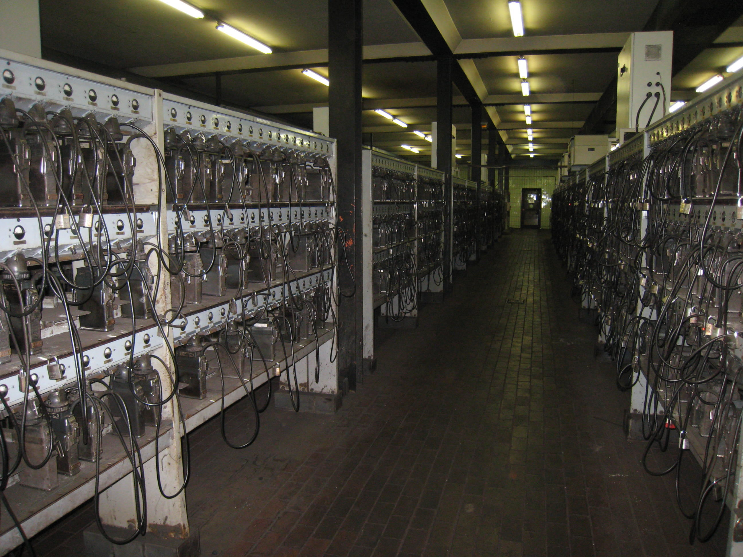 Lampenstube der Zeche Heinrich Robert, Bergwerk Ost, Hamm